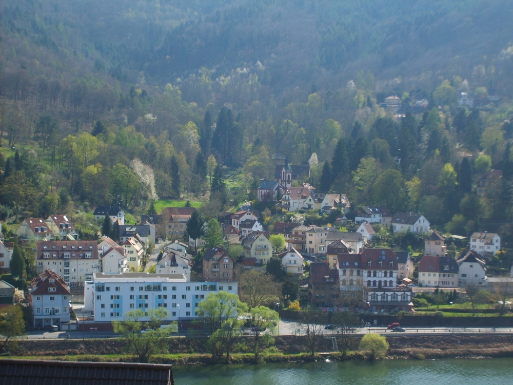 Schlierbach, Heidelberg, Germany